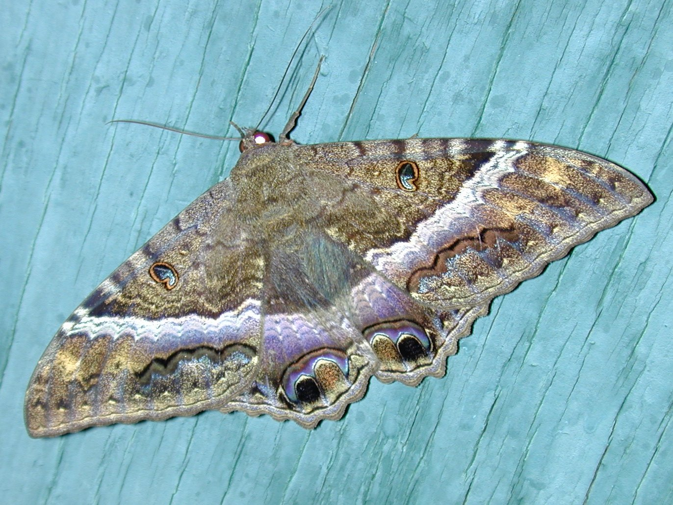 Ascalapha odorata from Hawai'i.